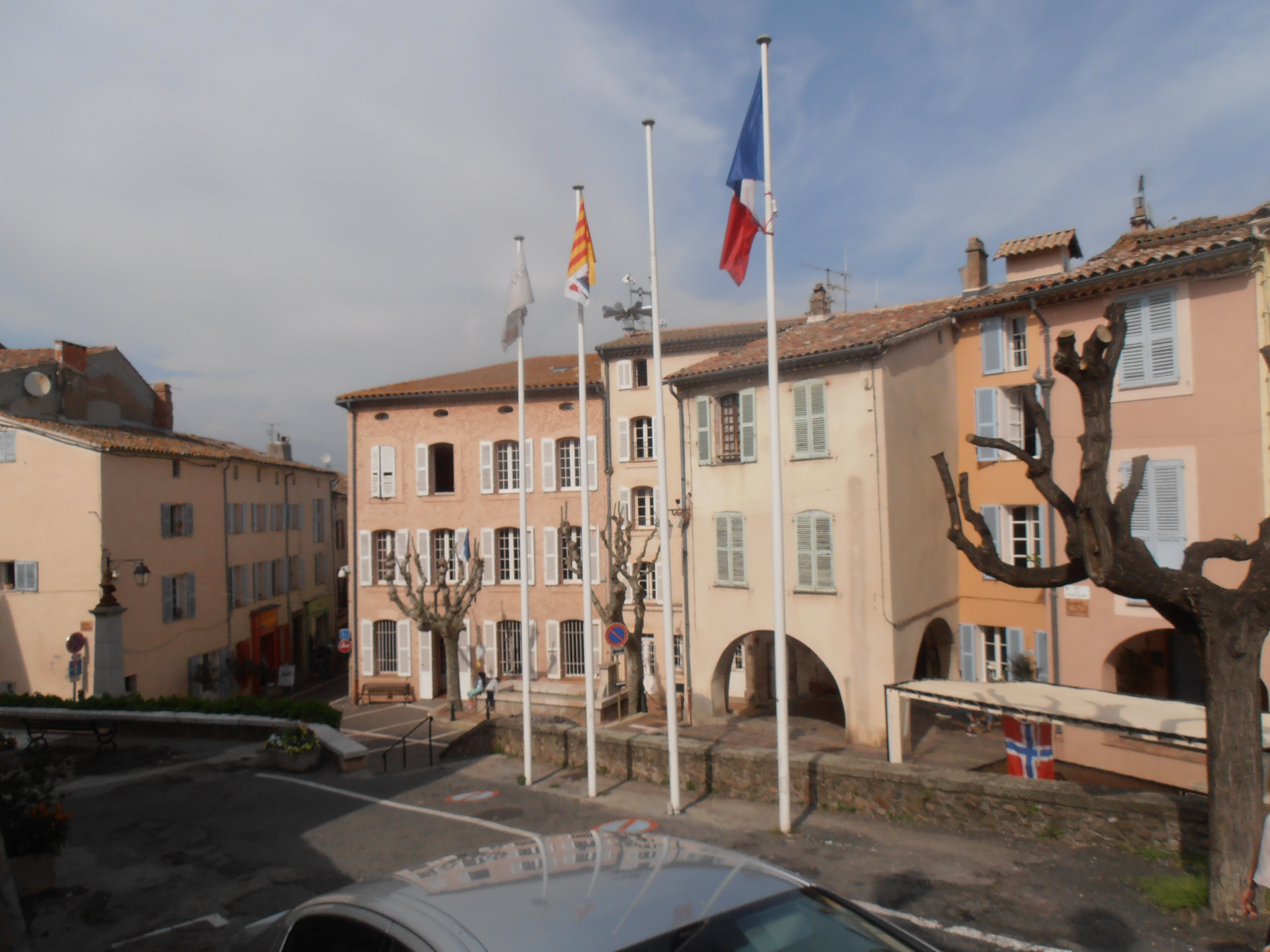 Var, Roquebrune-sur-Argens, Mairie